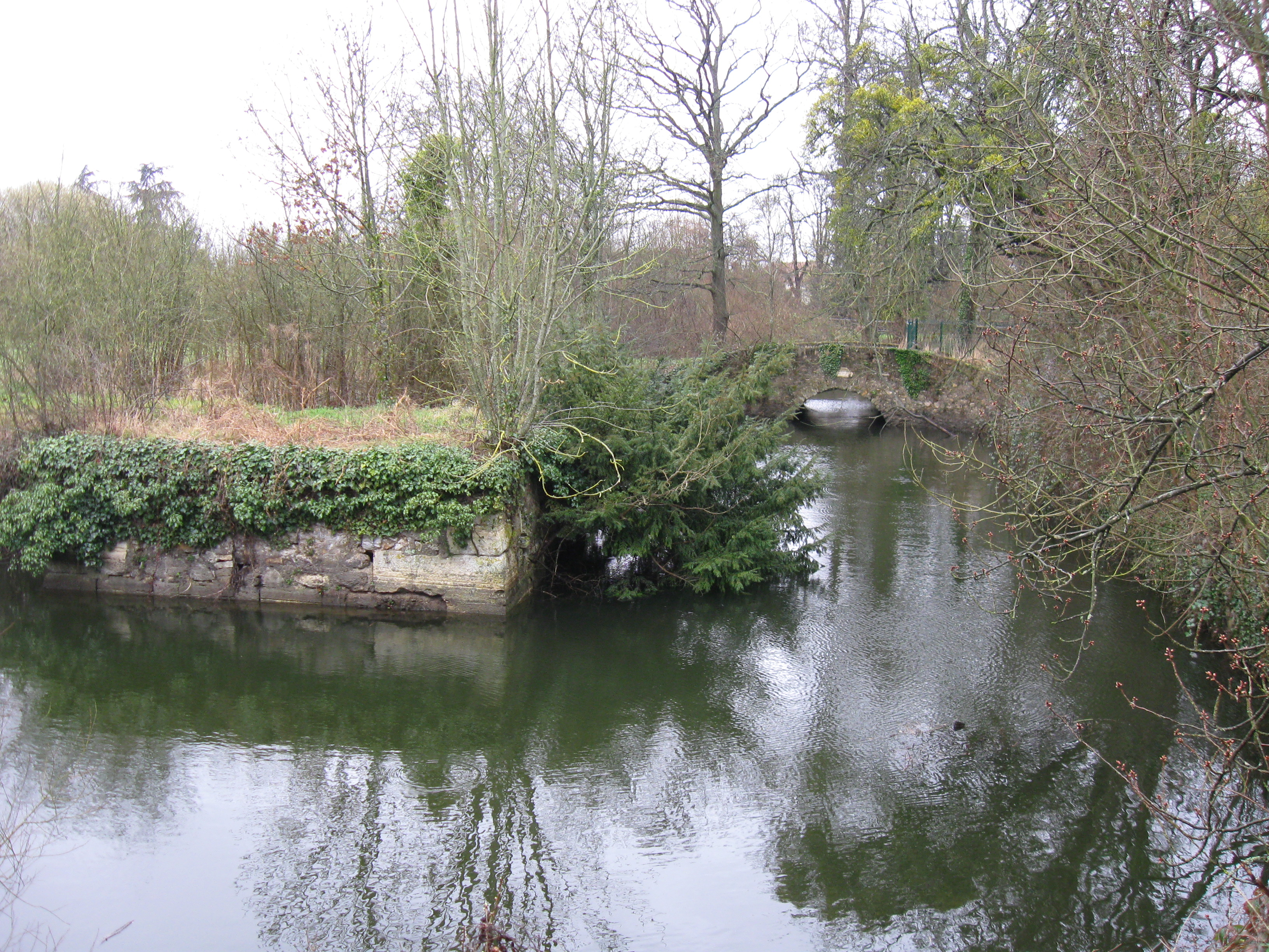 Restes des douves du premier château d'Émerainville dans le parc Denis le Camus. (Seine-et-Marne, région Île-de-France).